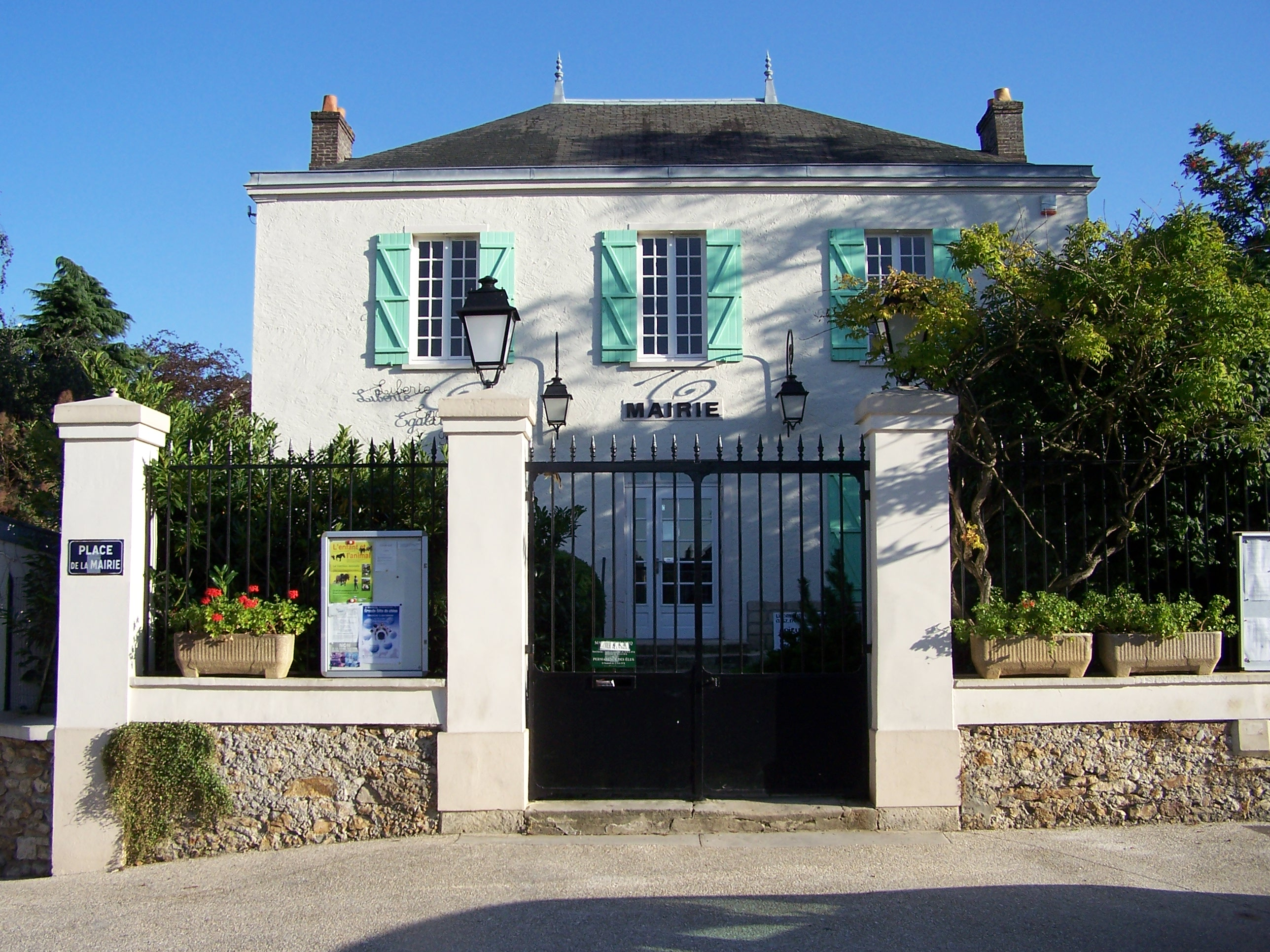 Mairie de Marcq (Yvelines, France)